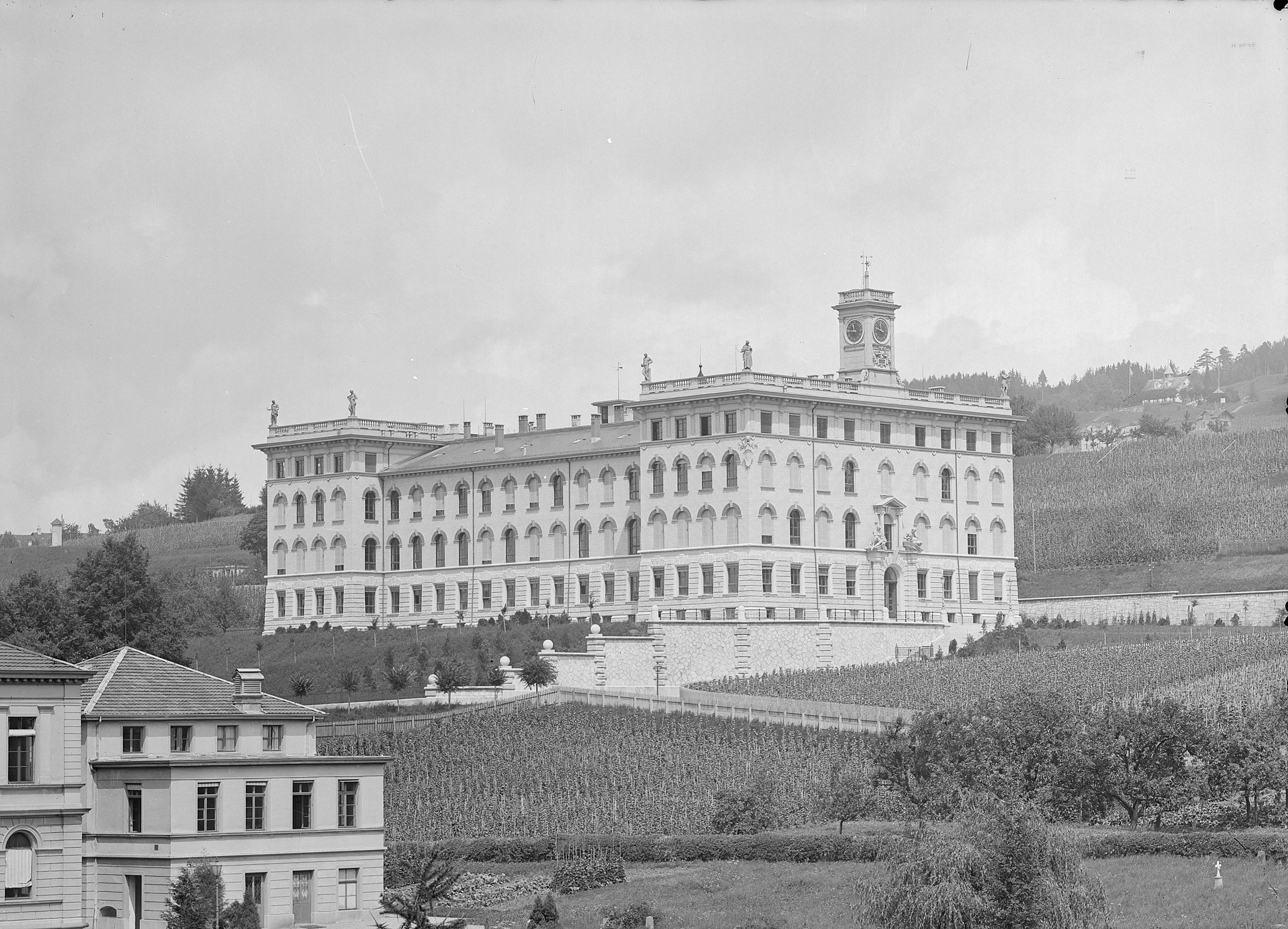 Physikgebäude der ETH, gebaut von 1887 bis 1890 an der Gloriastrasse 35 inmitten von Rebbergen